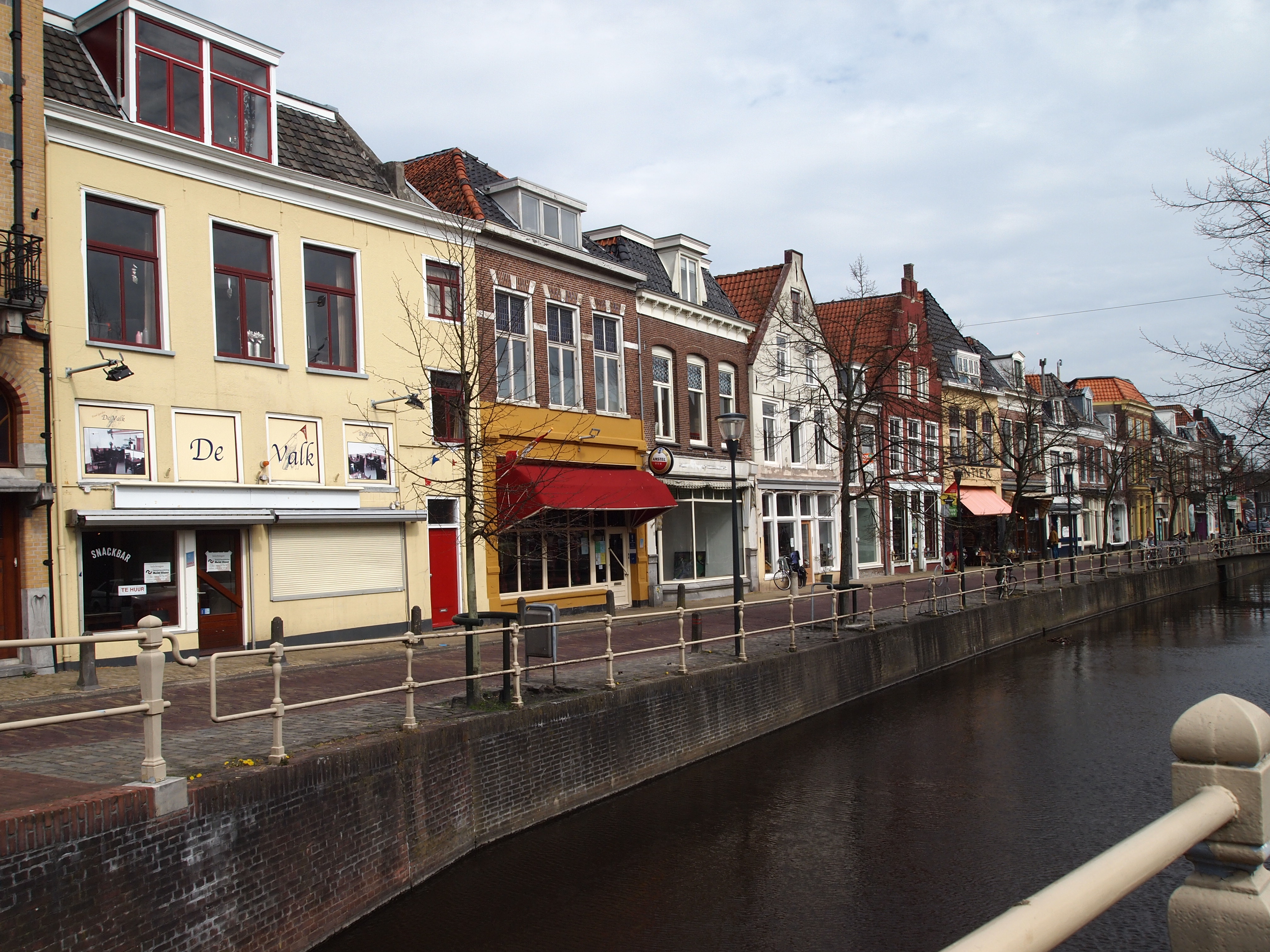 De TUINEN Leeuwarden